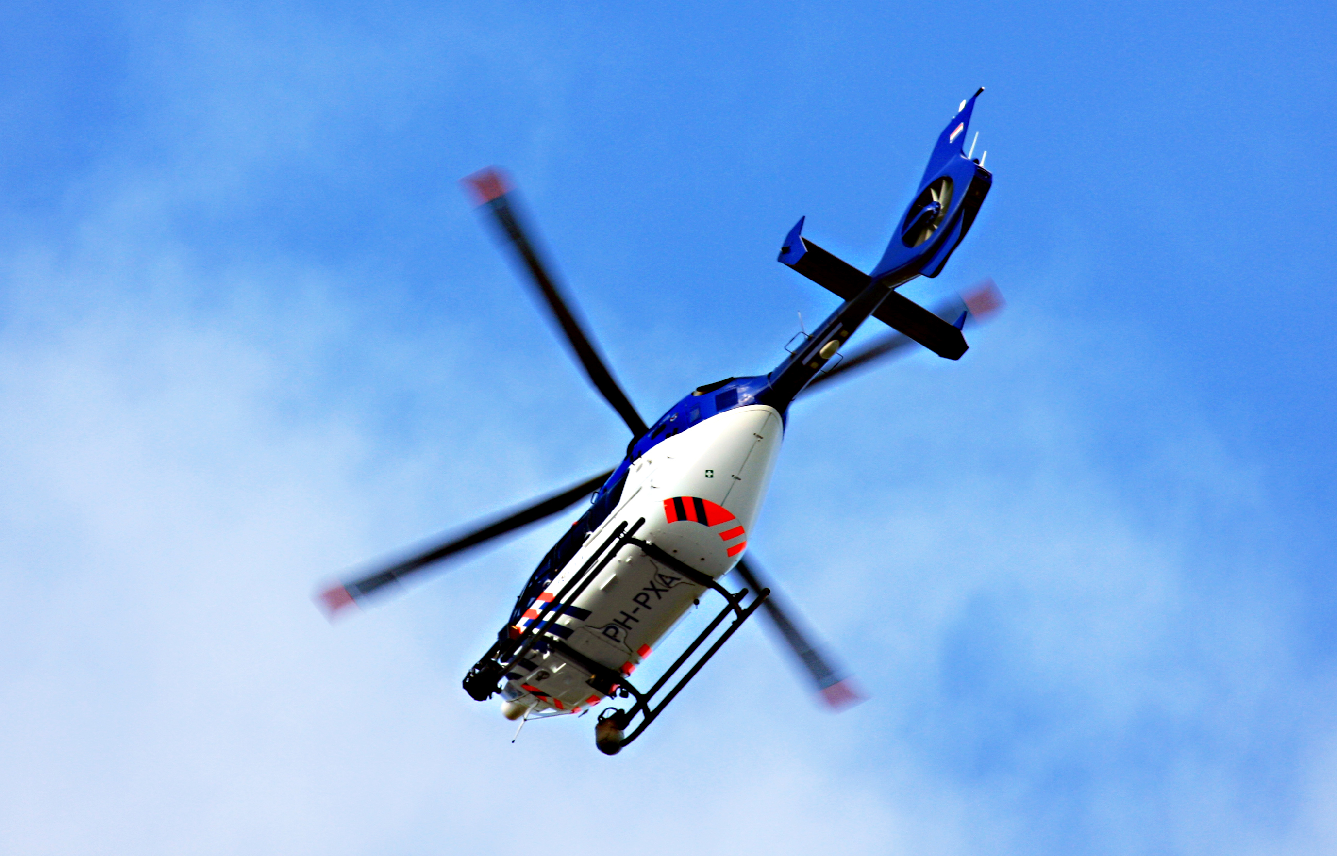 Politieheli EC135 PH-PXA